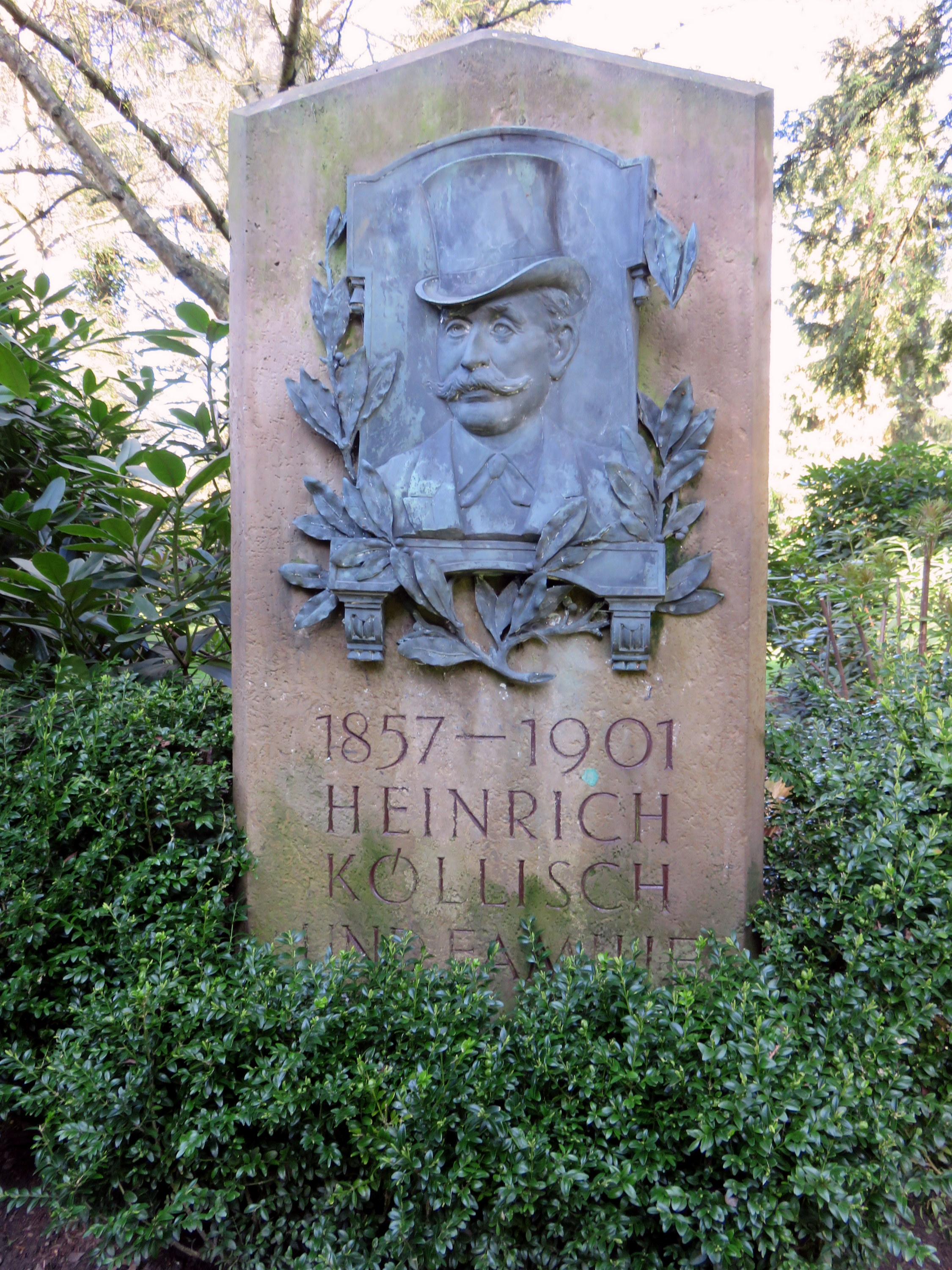 Grabmal des deutschen Volkssängers und Liedtexters Hein Köllisch auf dem Hamburger Friedhof Ohlsdorf, Q6/R6, 40-46 (nördlich des Althamburgischen Gedächtsnisfriedhofs). Details bei Barbara Leisner, Heiko K. L. Schulze, Ellen Thormann: Der Hamburger Hauptfriedhof Ohlsdorf. Geschichte und Grabmäler. 2 Bände und eine Übersichtskarte 1:4000. Hans Christians, Hamburg 1990, ISBN 3-7672-1060-6, Seite 58, Kat. Nr. 329, sowie hamburg-bildarchiv (historiche Abbildung von 1902).